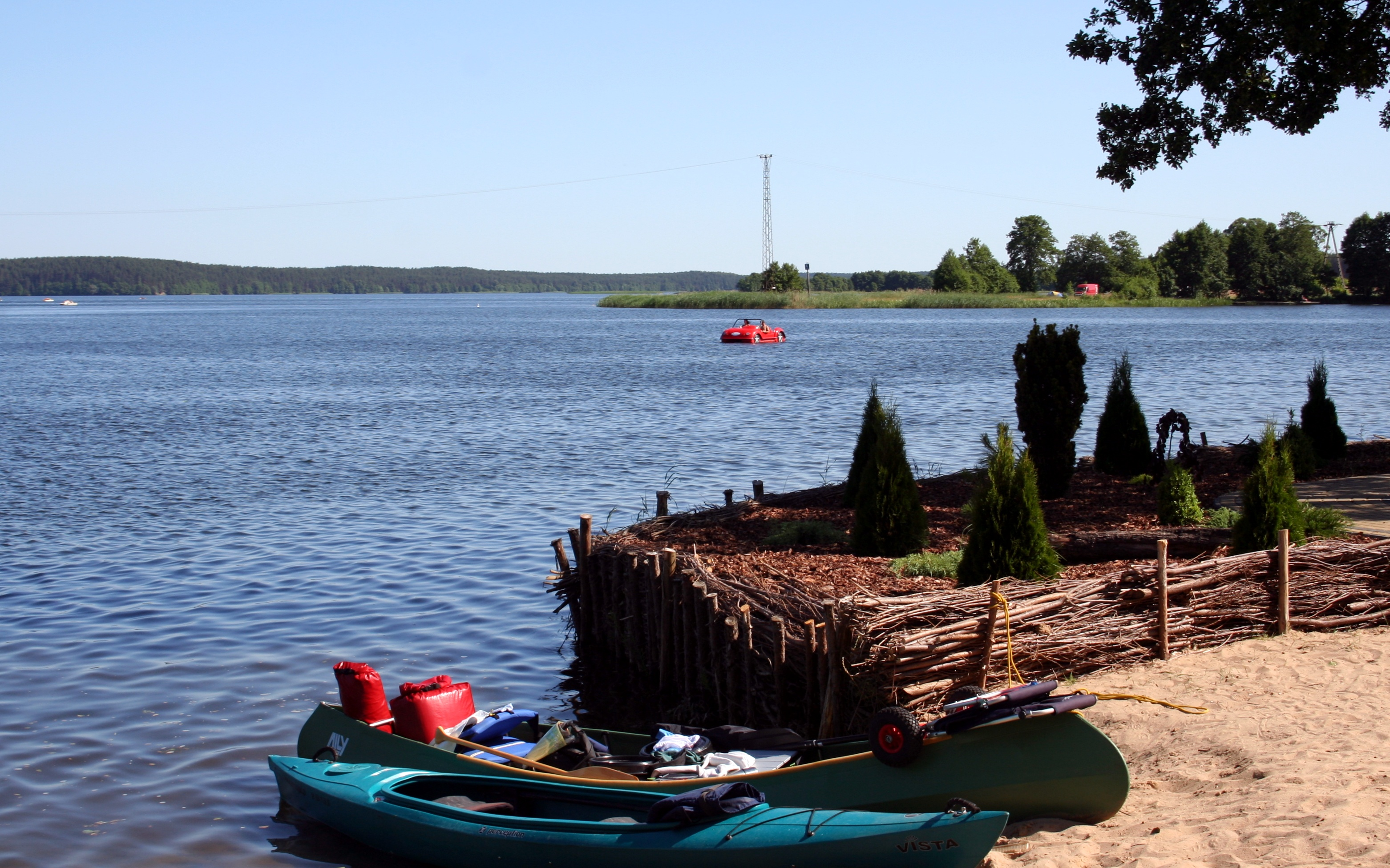 Jezioro Karsińskie w Swornychgaciach